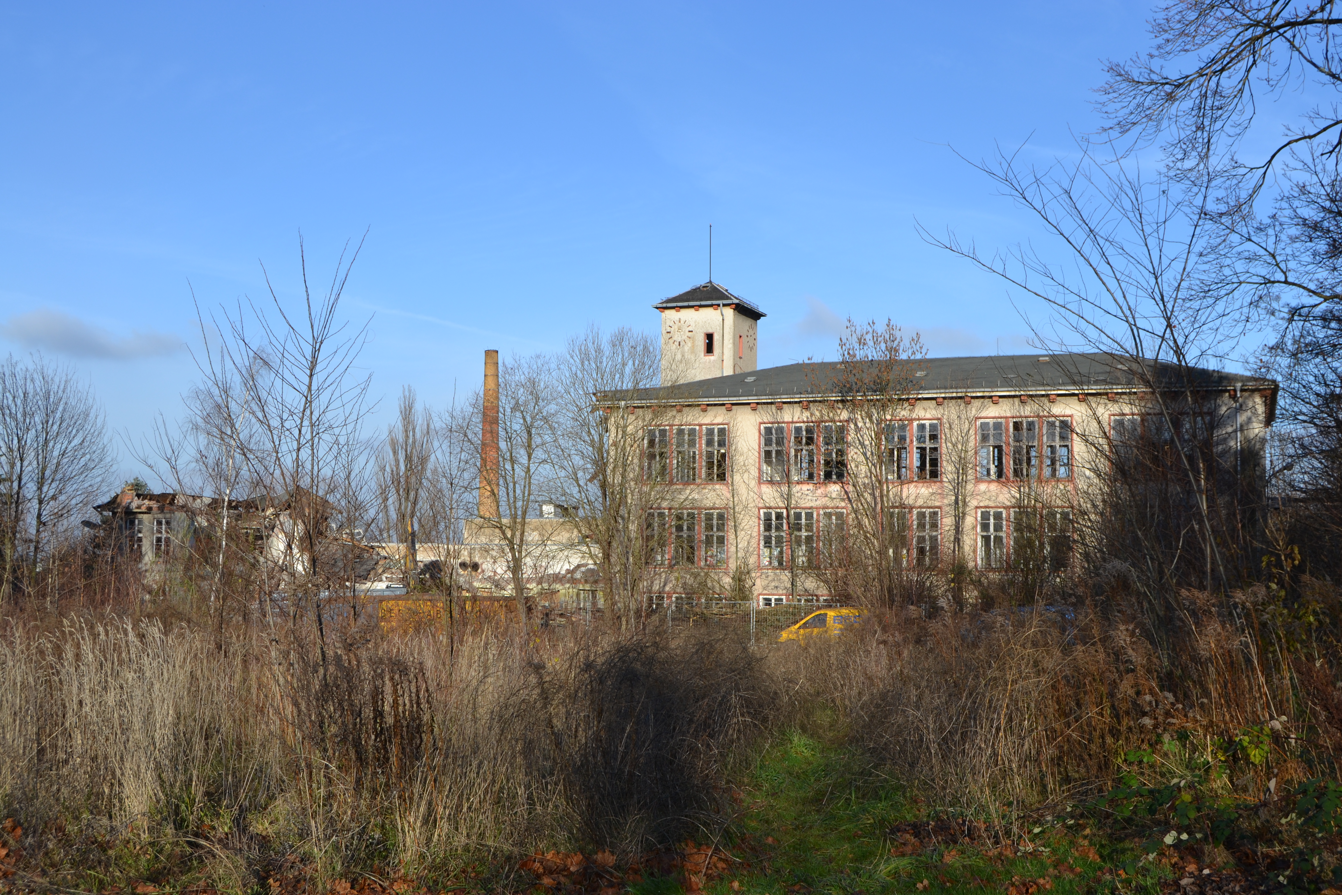 VEB Strickwarenfabrik Aktivist Planitz